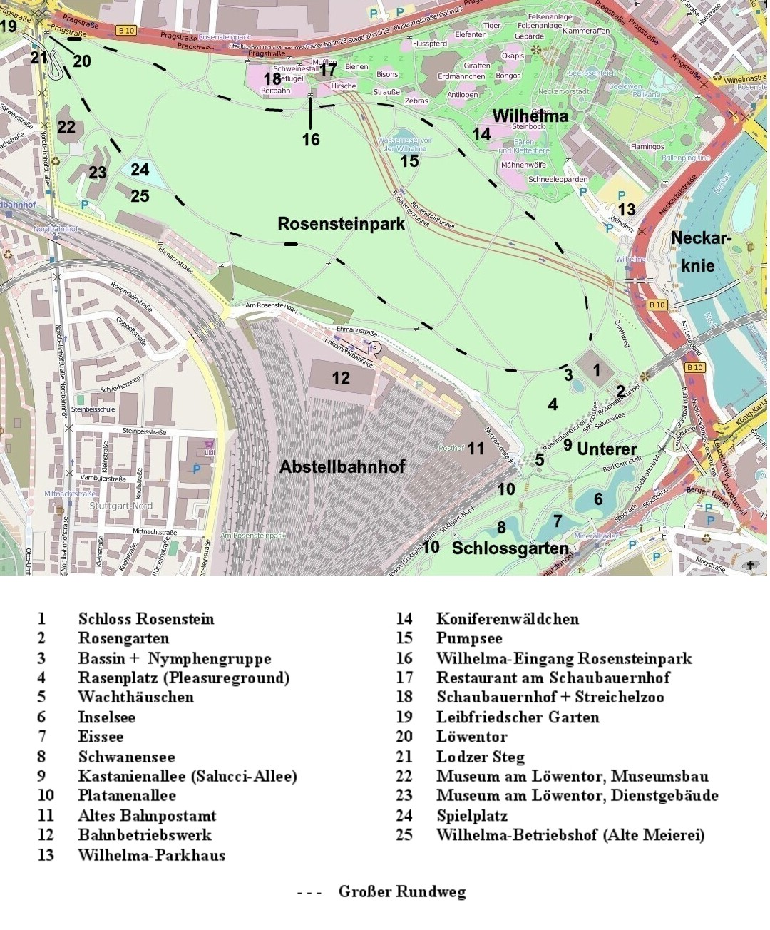 Rosensteinpark, Stuttgart, Lageplan (OpenStreetMap ergänzt).